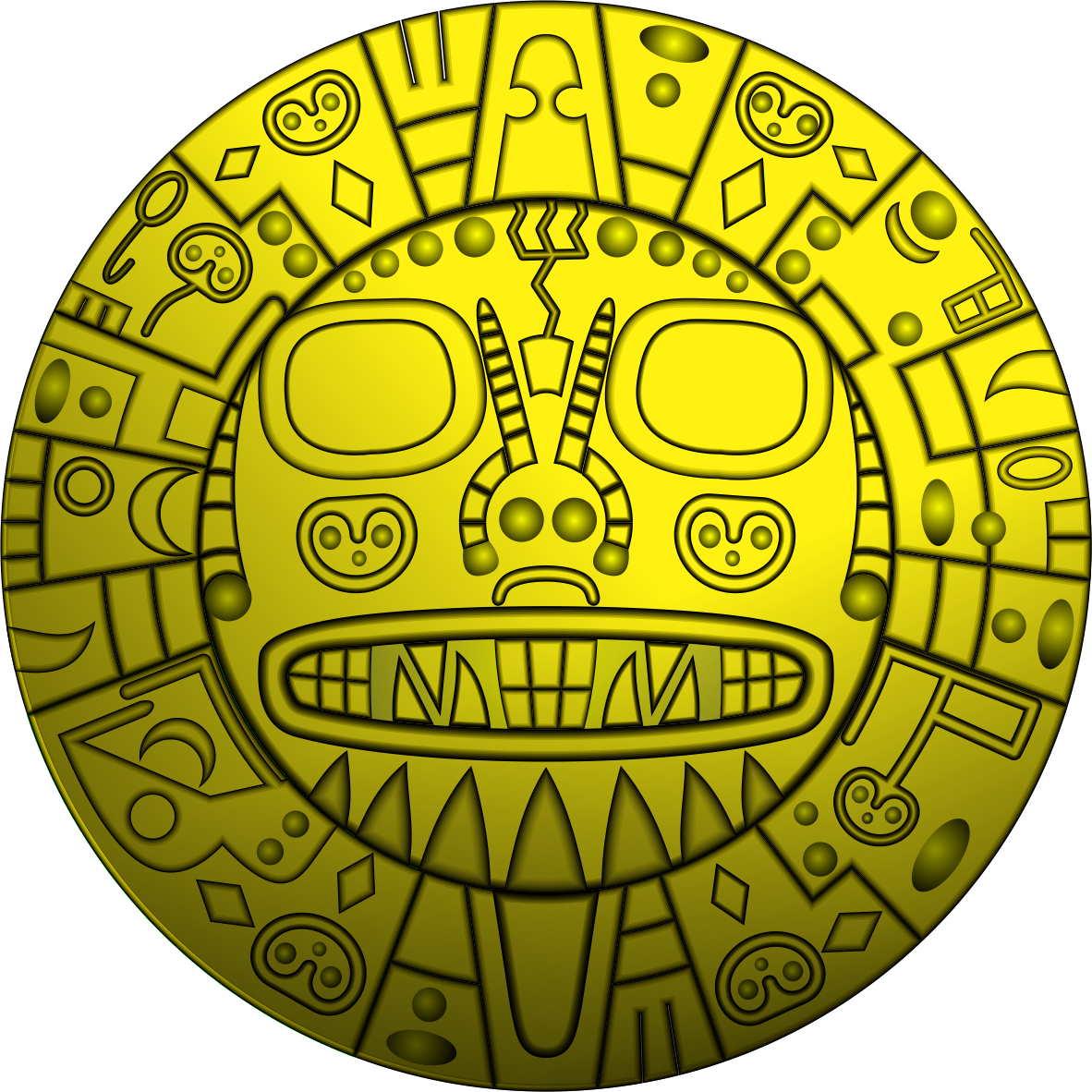 Decreto Municipal Nº.63 del 23 de junio de 1986: "Decidido a "Establecido como un disco escudo oficial de Cusco llamada "placa de Echenique Y "Prohibir cualquier representación requerida por el escudo heráldico de la conquista del Cusco. Se decidió que "Es imprescindible destacar y evaluar de nuevo las verdaderas expresiones y los símbolos del antiguo Perú, más aún desde que la ciudad de Cuzco, capital de los Bancos Andino Natural Mundial, donde la gloria ha pasado todavía la prueba de grandeza" Fuentes: Símbolos de la ciudad de Cusco, El disco solar del Cusco